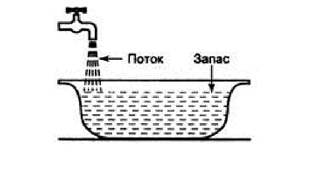 Макроекономічні змінні: потік і запас